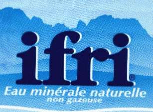 Logo ifri, société d'eau minérale en Algérie